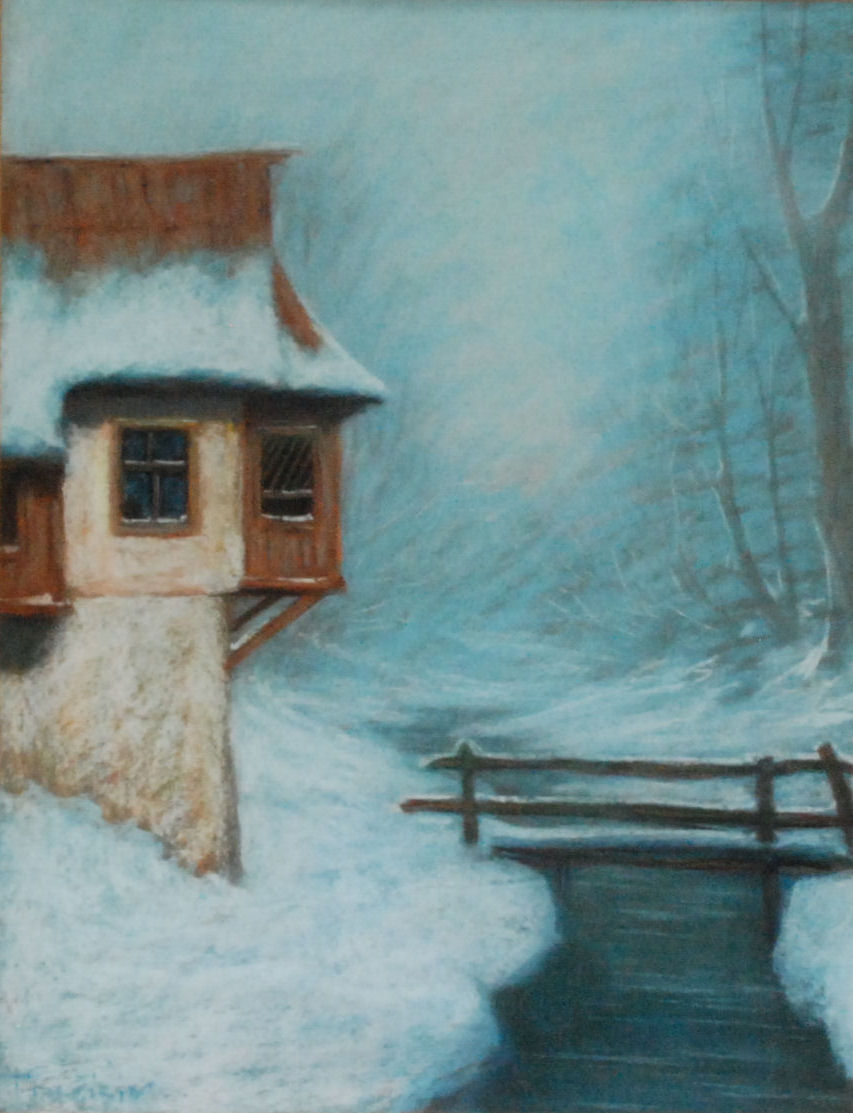 Kreide: 48 x 63, entstanden um 1920 in Zagreb. Das Bild zeigt vergitterte Fenster eines offenbar muslemischen Wohnhauses für Frauen in den bosnischen Bergen bei klirrender Kälte.